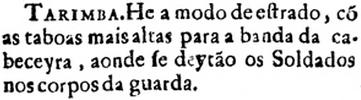 Tarimba